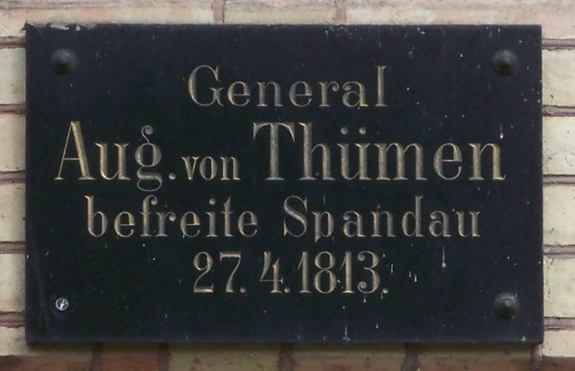 Gedenktafel zur Befreiung Spandaus (1913)